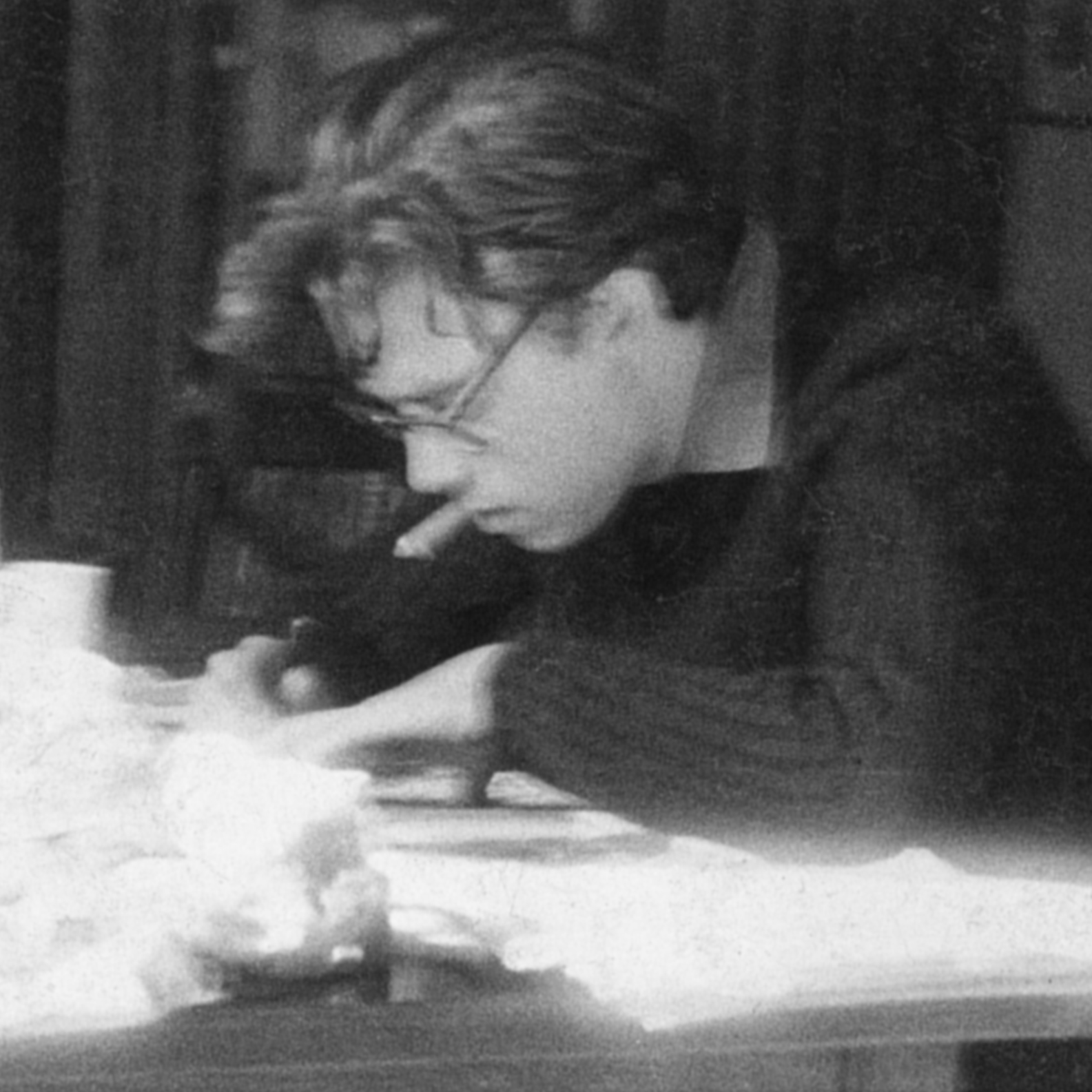 Klaus-Peter Dienst bei der Arbeit mit Stift und Papier